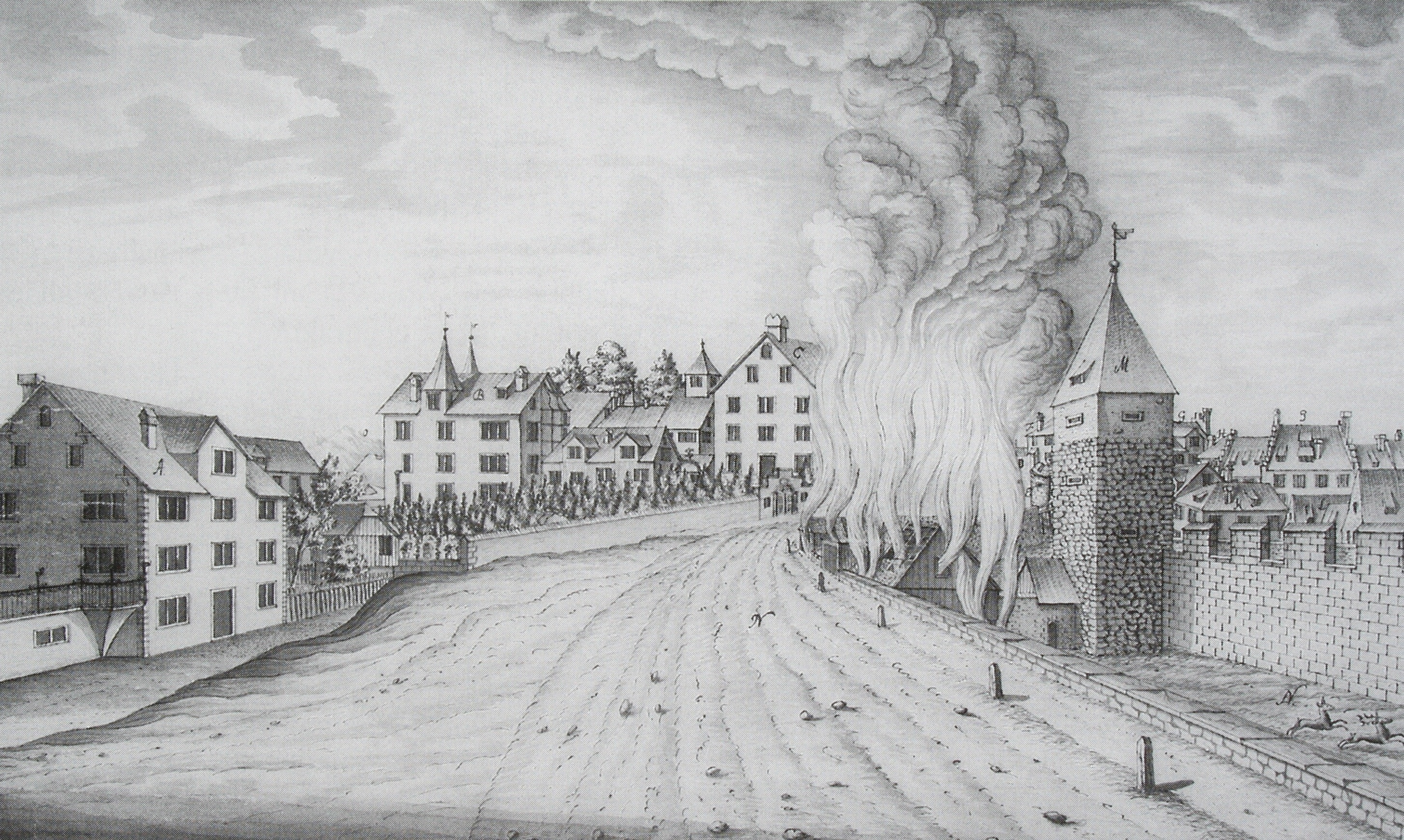 Brand des Hirschenhäuschens vom 13. September 1744. Hirschengraben und Wolfsturm gegen Südwesten. Lavierte Federzeichnung von Hans Conrad Nötzli, 1744